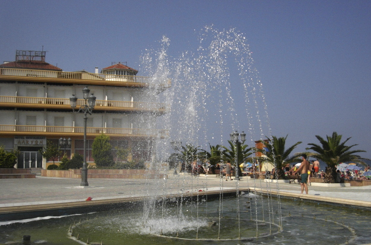 Fountain in Paralia, Pieria.